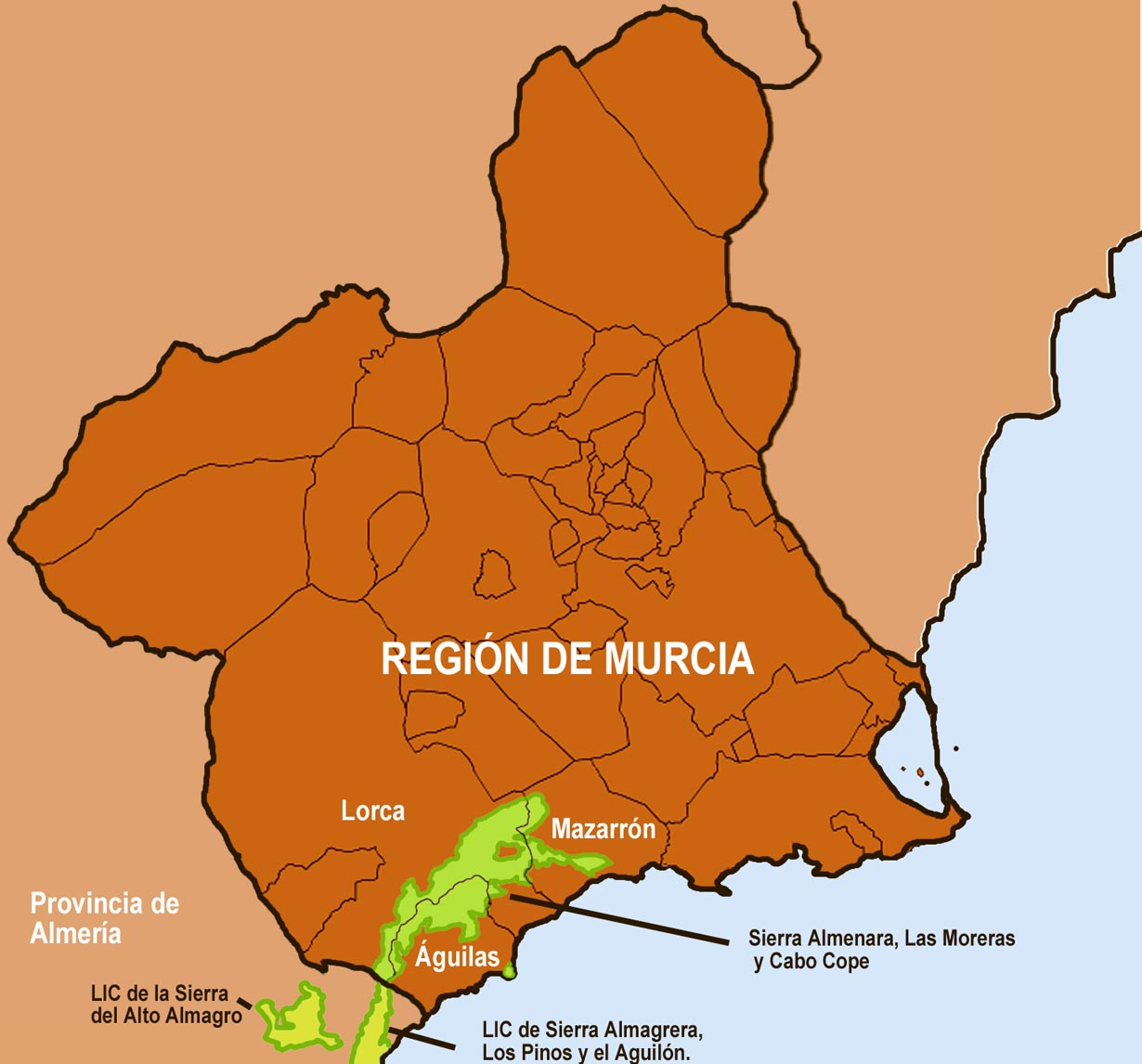 LIC de la Sierra de la Almenara, las Moreras y Cabo Cope. Región de Murcia (Spain).